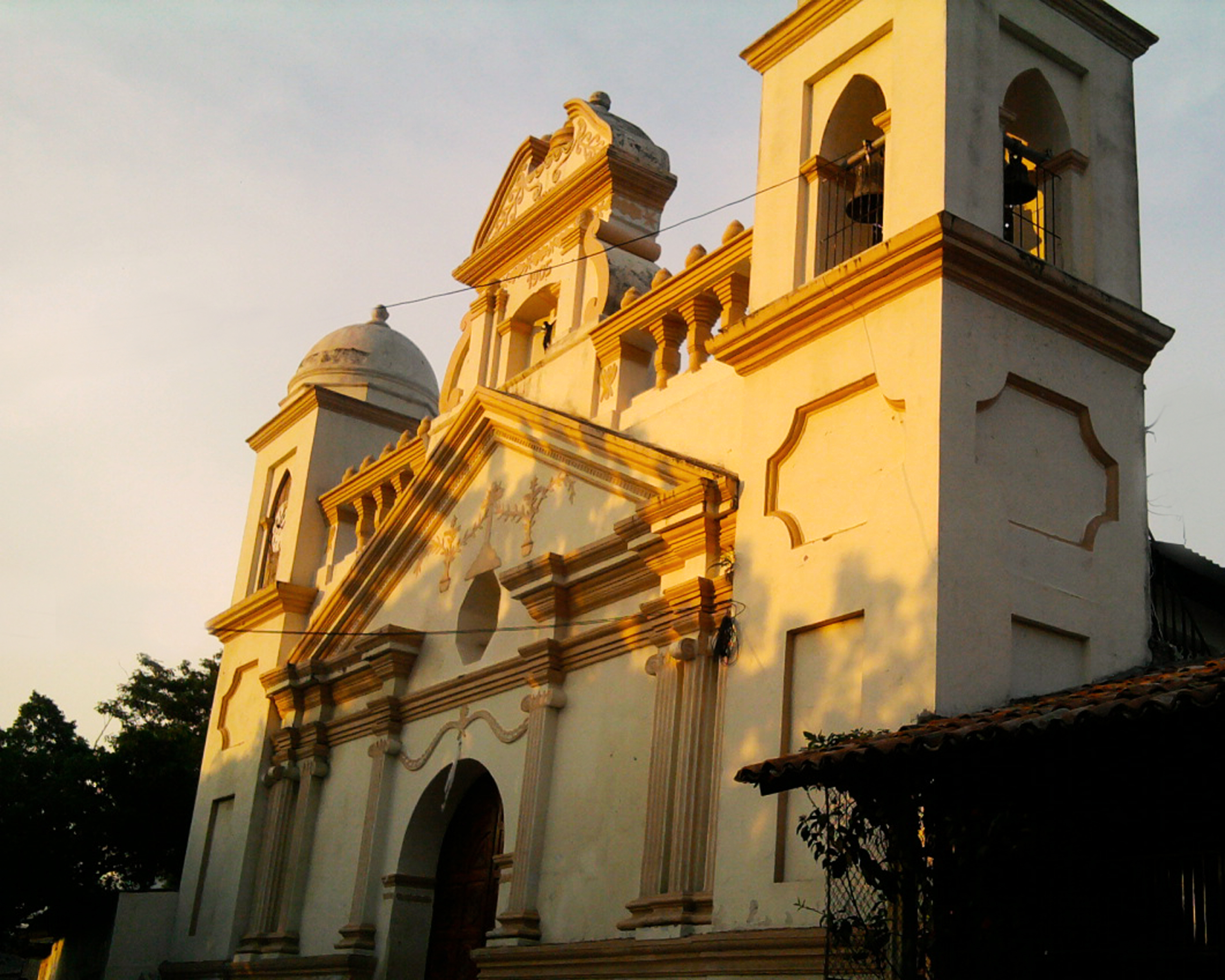 Fachada principal de Iglesia Parroquial de San Alejo que data desde 1905